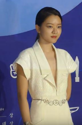 5월 1일 오후 서울시 강남구 삼성동 코엑스에서 제 55회 백상예술대상 시상식 레드카펫 행사가 열렸다.